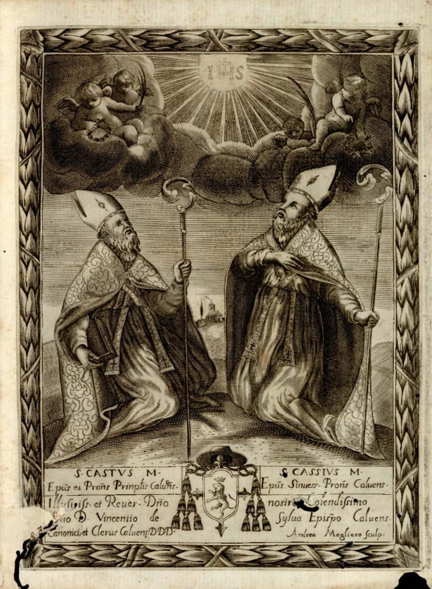 Vita e passione Delli Gloriosi Martiri Santo Casto vescovo di Calvi, e Santo Cassio Vescovo di Sinuessa. Con alcune notizie della Città di Calvi, e de suoi Vescovi, & altre antiche memorie. Scritte Dal Dott. D. Giuseppe Cerbone Prete Secolare, Prothonotaro Apostolico, Theologo, & Esaminatore Sinodale della Corte Vescovale Calvense. Dedicate all'Ill.mo e Rever.mo Sig.re Monsig. Vincenzo De Silva Vescovo di detta Città di Calvi.